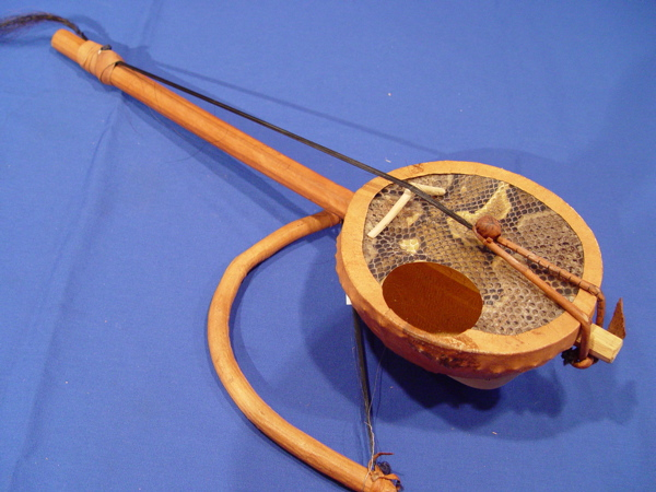 El goje es una viola de dos cuerdas de Ghana del norte. La piel de serpiente cubre un tazón de porongo, y una cuerda de crines es suspendida sobre el puente. El goje se toca con arco de cuerda. Se suele usar en la música hausa.